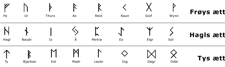 Runer - Den eldre Futhark besto av 24 runetegn. Dette er den eldste 24-runers Futharken vi kjenner til, men ingen vet hvor, når og fra hvem runene oppsto. De eldste innskripsjonene vi kjenner til er funnet i Øst-Europa, i Pieetrossa i Romania, Dahmsdorf i Tyskland og Kowel i Russland, og stammer fra ca. år 100-200 e. Kr. Noen mener at runene faktisk oppsto i dette området, andre at det skjedde i et av alpelandene, i det sørlige Sveits og det nordlige Italia. En tredje utbredt hypotese er at runene ble oppfunnet i det sydlige Jylland i Danmark.